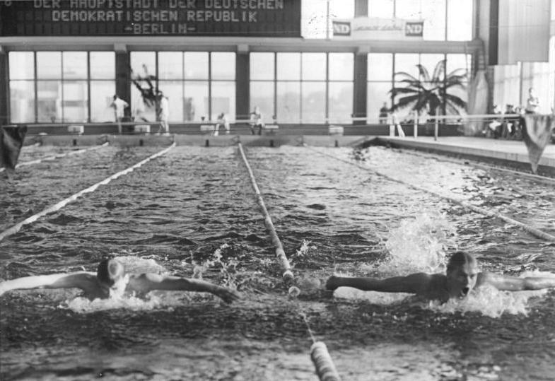 Udo Poser, Wolfgang Platzeck Zentralbild Studré 13.10.1967 Berlin: Deutsche Meisterschaften der DDR in Sportschwimmen Harter Zweikampf beim Vorlauf über 200 m Delphin der Herren bei den Titelkämpfen am 13.10.1967 in der Dynamo-Schwimmhalle des Berliner Sportforums. Durch Zielrichterentscheid wurde Udo Poser (ASK Vorwärts Rostock, rechts), der sich bereits zwei Einzelmeistertitel erkämpfen konnte, auf Platz 1 gesetzt. Links Wolfgang Platzeck (SC DHfK Leipzig), der sich ebenfalls für das Finale qualifizierte.